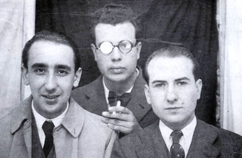 Álvaro Cunqueiro, Francisco Fernández del Riego e Ricardo Carballo Calero en Santiago de Compostela nos anos 30.